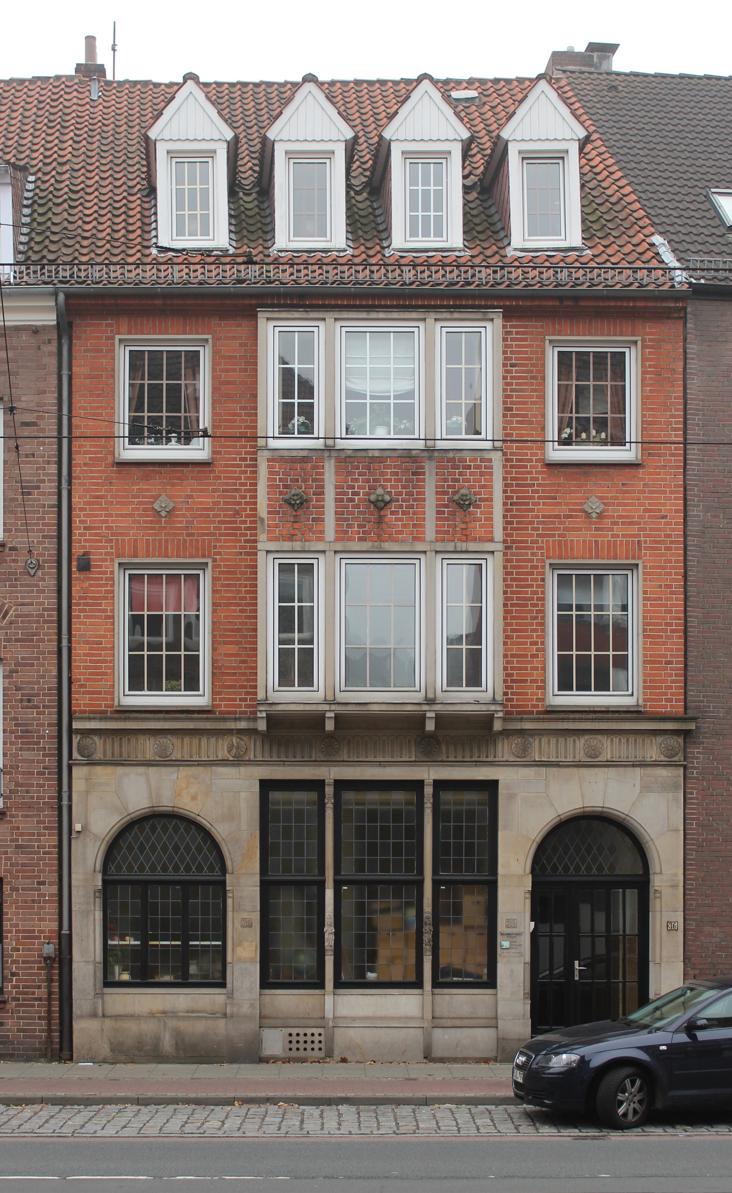 Haus Soltmann in Bremen, Osterstraße 36. Das abgebildete Objekt ist ein geschütztes Kulturdenkmal in der Freien Hansestadt Bremen, mit der Nr. 0990 beim Landesamt für Denkmalpflege registriert.